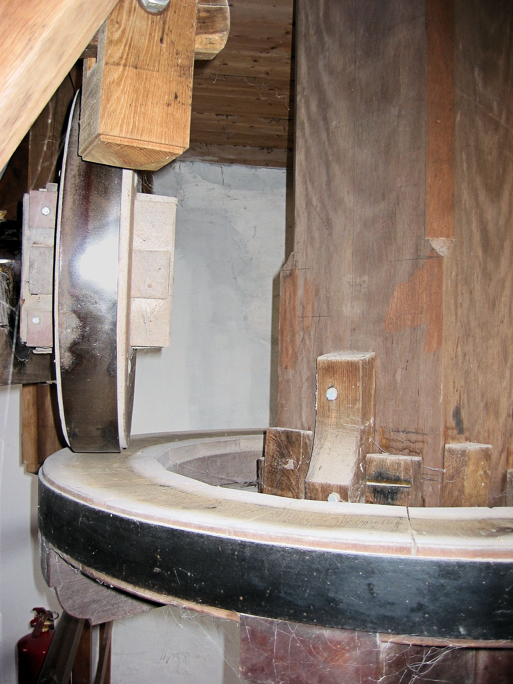 Sleepluiwerk van de molen Op Hoop Van Beter, Ingen, Gelderland, the Netherlands